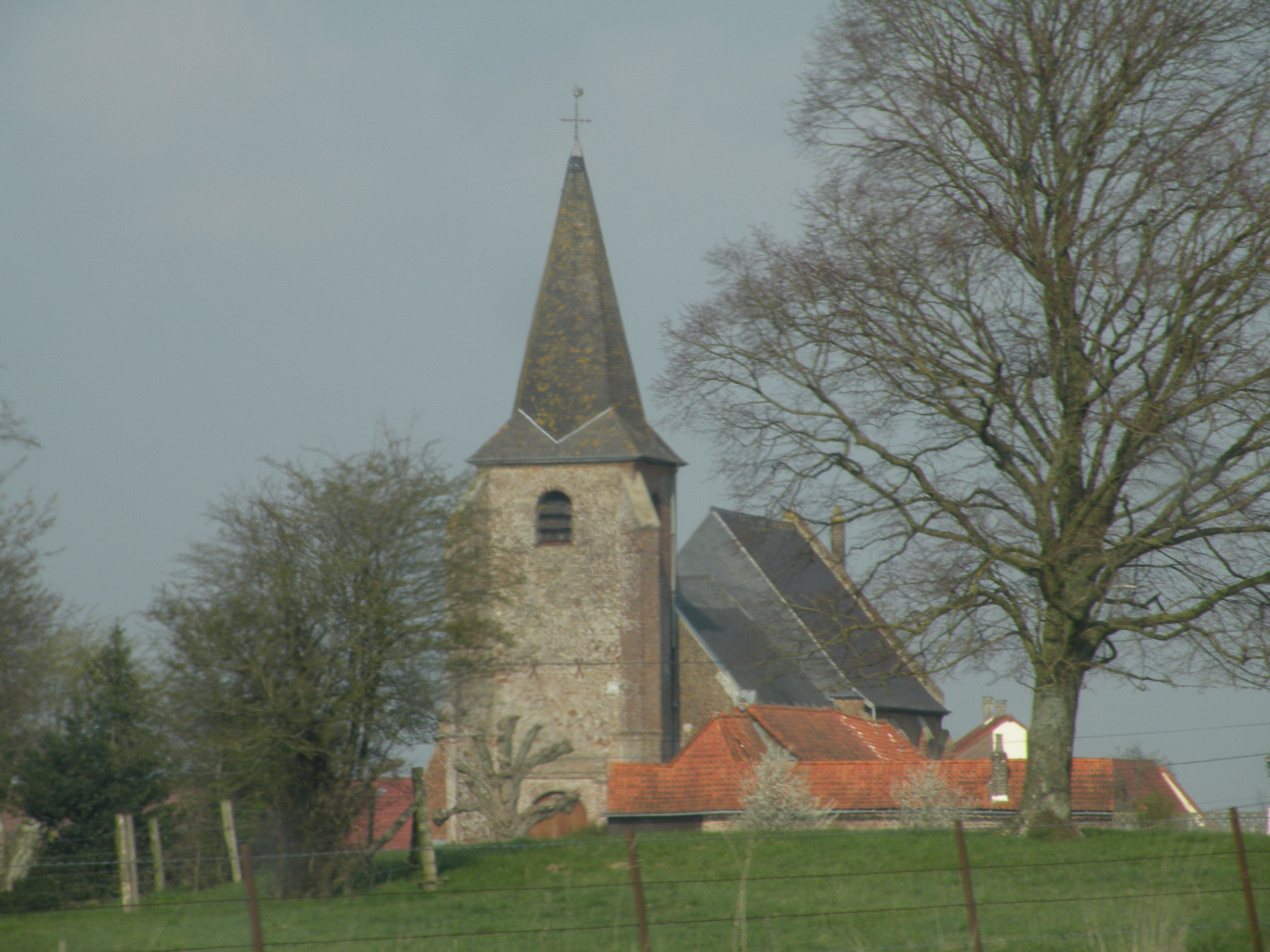 Église du Parcq.